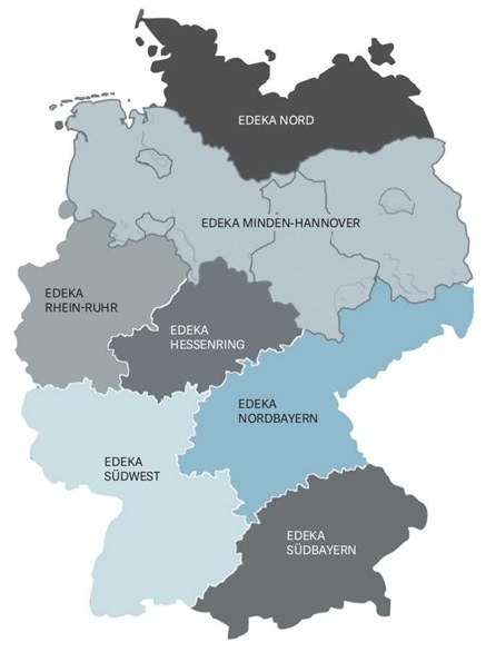 Aufteilungen der sieben Regionalgesellschaften des EDEKA Verbunds innerhalb Deutschlands. Die EDEKA-Zentrale hat ihren Sitz in Hamburg.